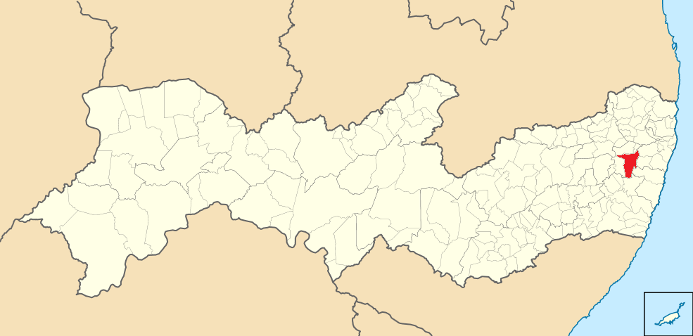 Mapa Vitória de Santo Antão